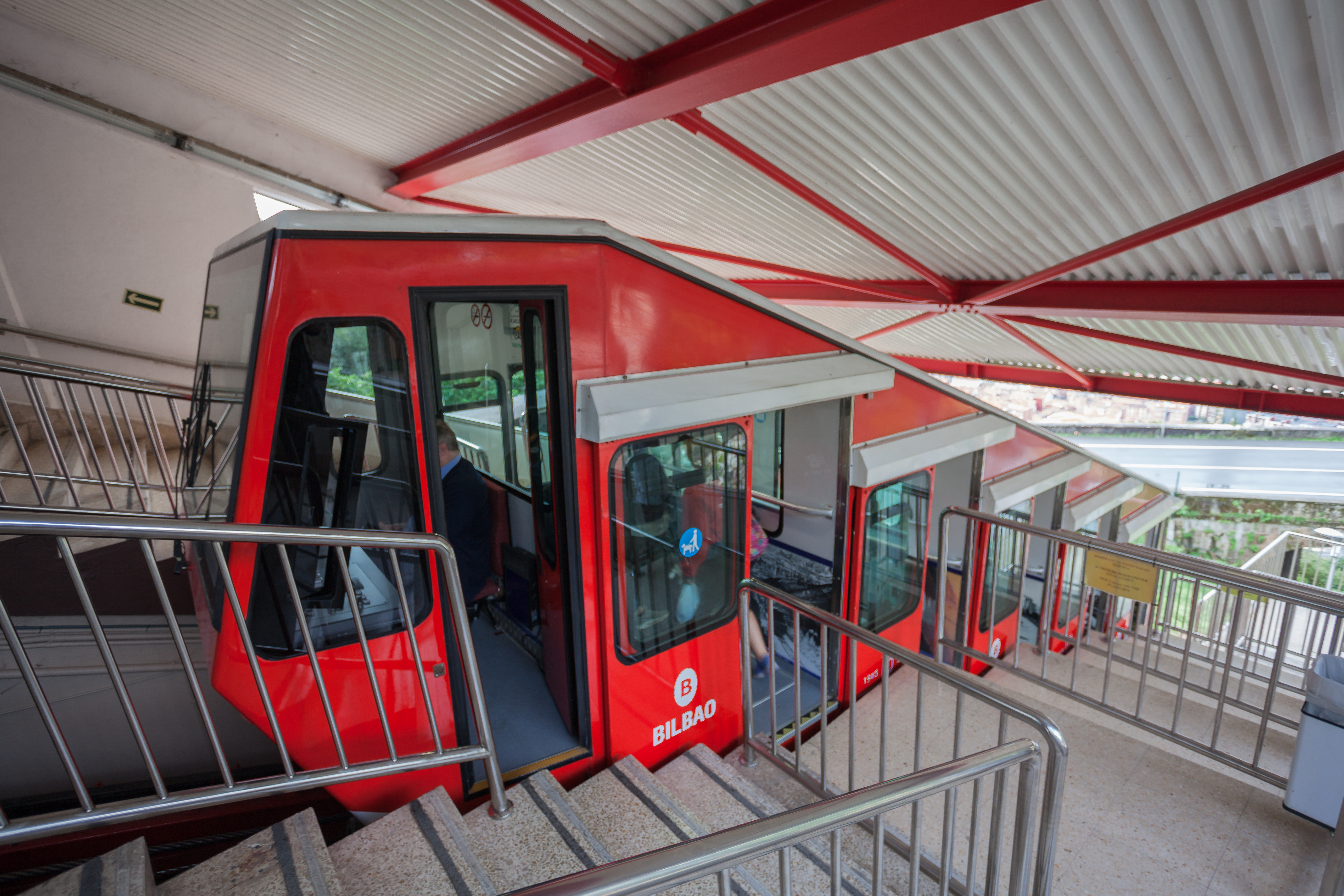 Funicular de Artxanda